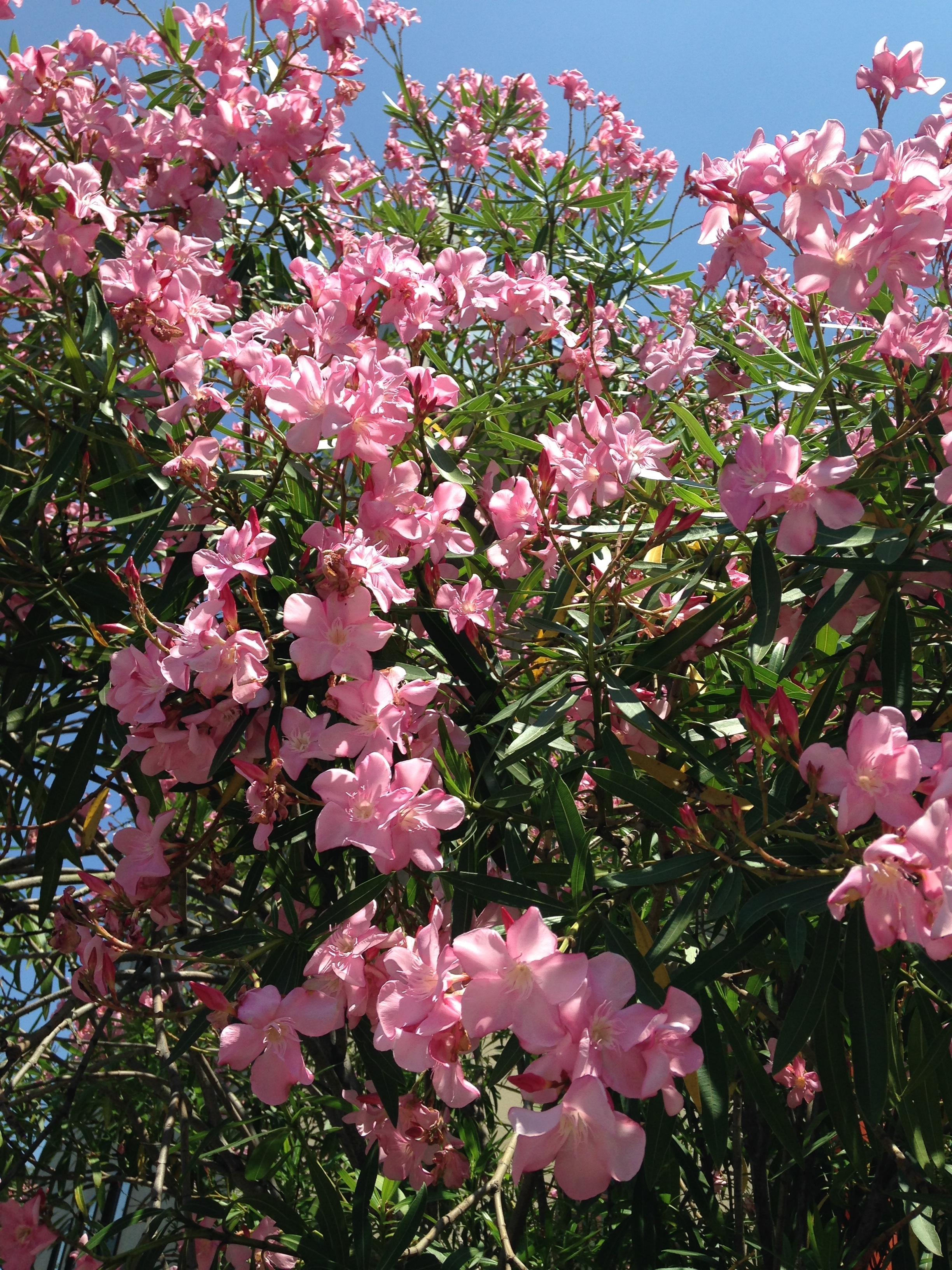 キョウチクトウの花